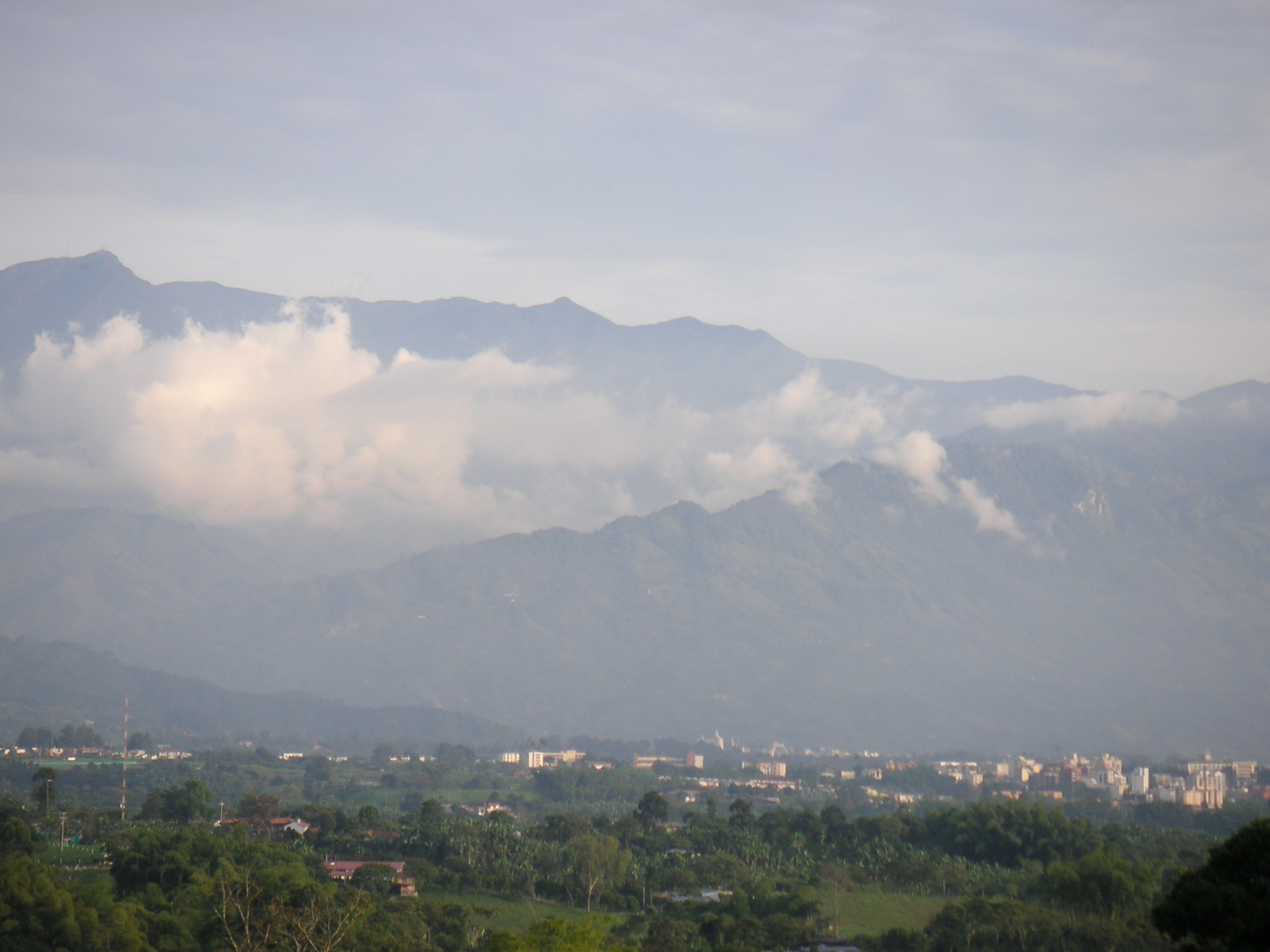 Description: Armenia, Departamento de Quindio, Colombia Source: Louise Wolff (darina), March 2005